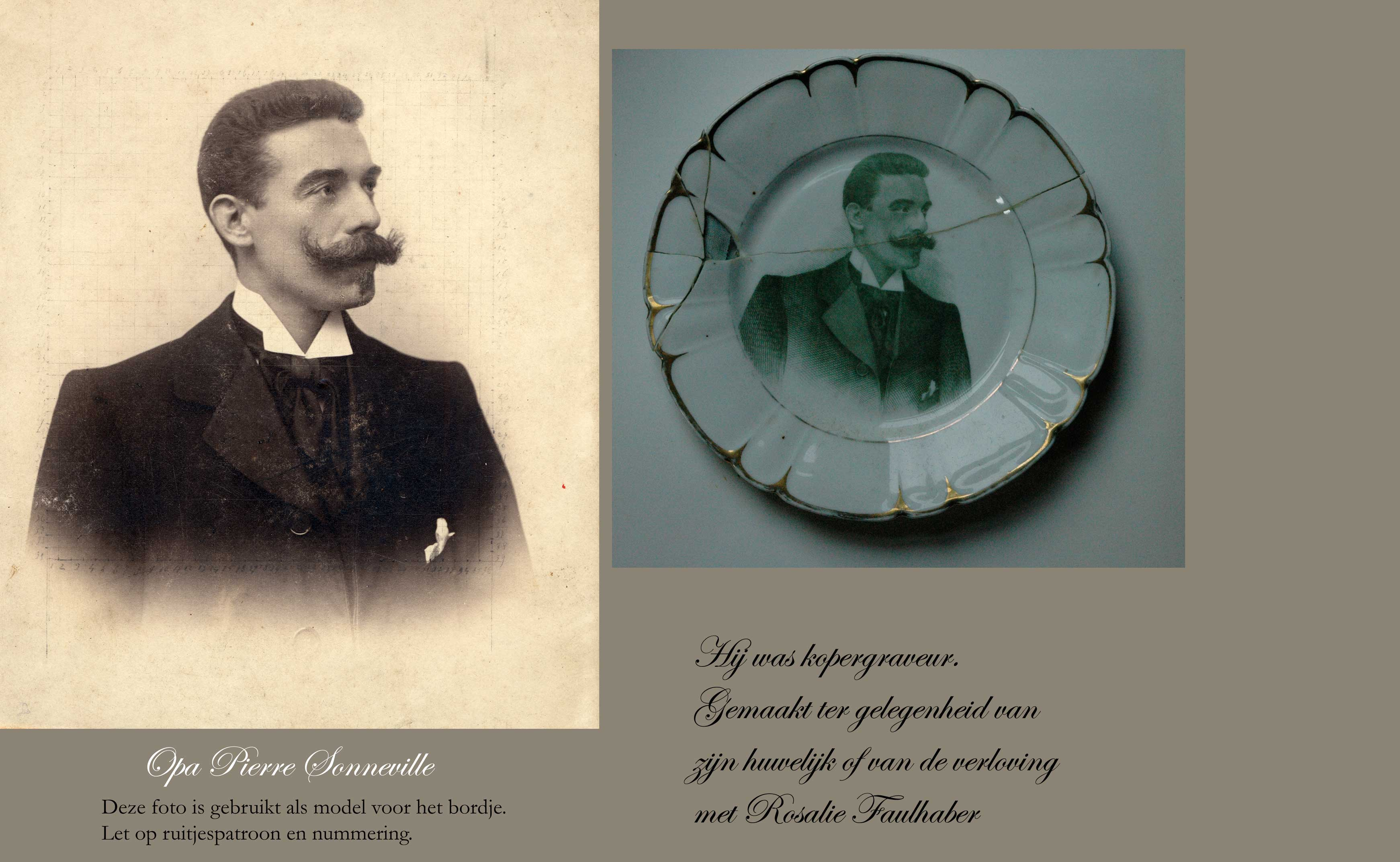 Dit is een foto van mijn grootvader en een bordje dat hij bij De Sphinx gemaakt zal hebben, mogelijk voor zijn tweede echtgenote (mijn grootmoeder) toen hij trouwde of toen hij zich met haar verloofde. Op de foto is als je hem uitvergroot een dun ruitjespatroon te zien, een onderverdeling dus, en van deze foto is Pierre dus uitgegaan! Zijn oudste zoons, uit het eerste huwelijk waren Louis, Jef (Zjo) William en Pierre. Zijn tweede echtgenote schonk hem een dochter, Alice, en Fons die net als Louis en Jef in dezelde branche ging werken en zeer bekend werd als graveur